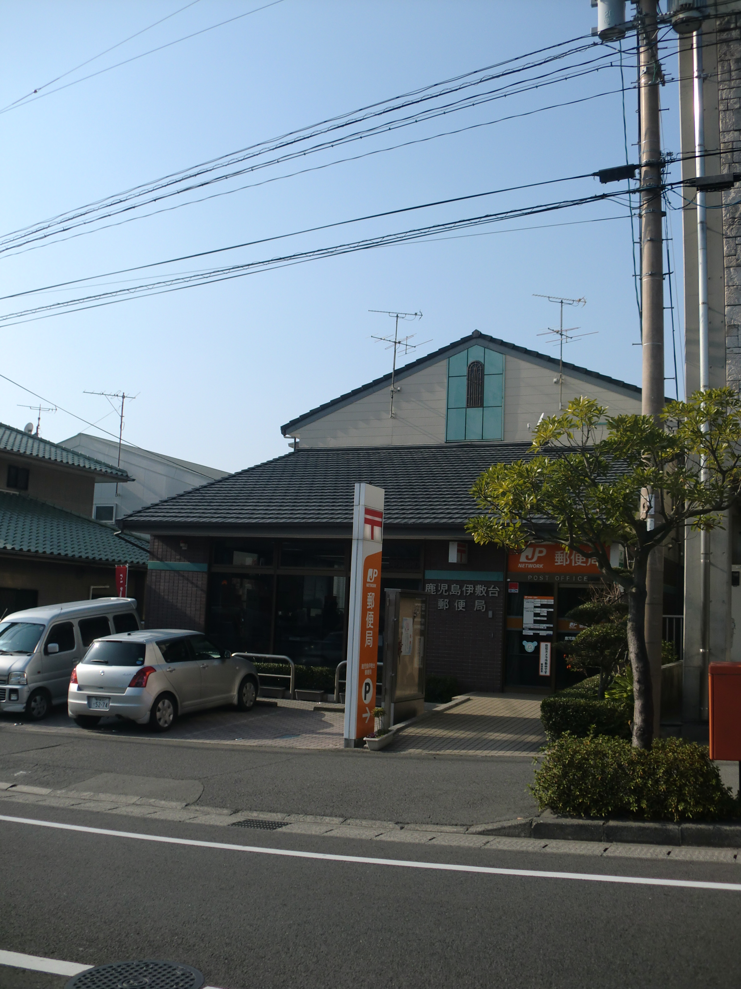 鹿児島市にある鹿児島伊敷台（かごしまいしきだい）郵便局